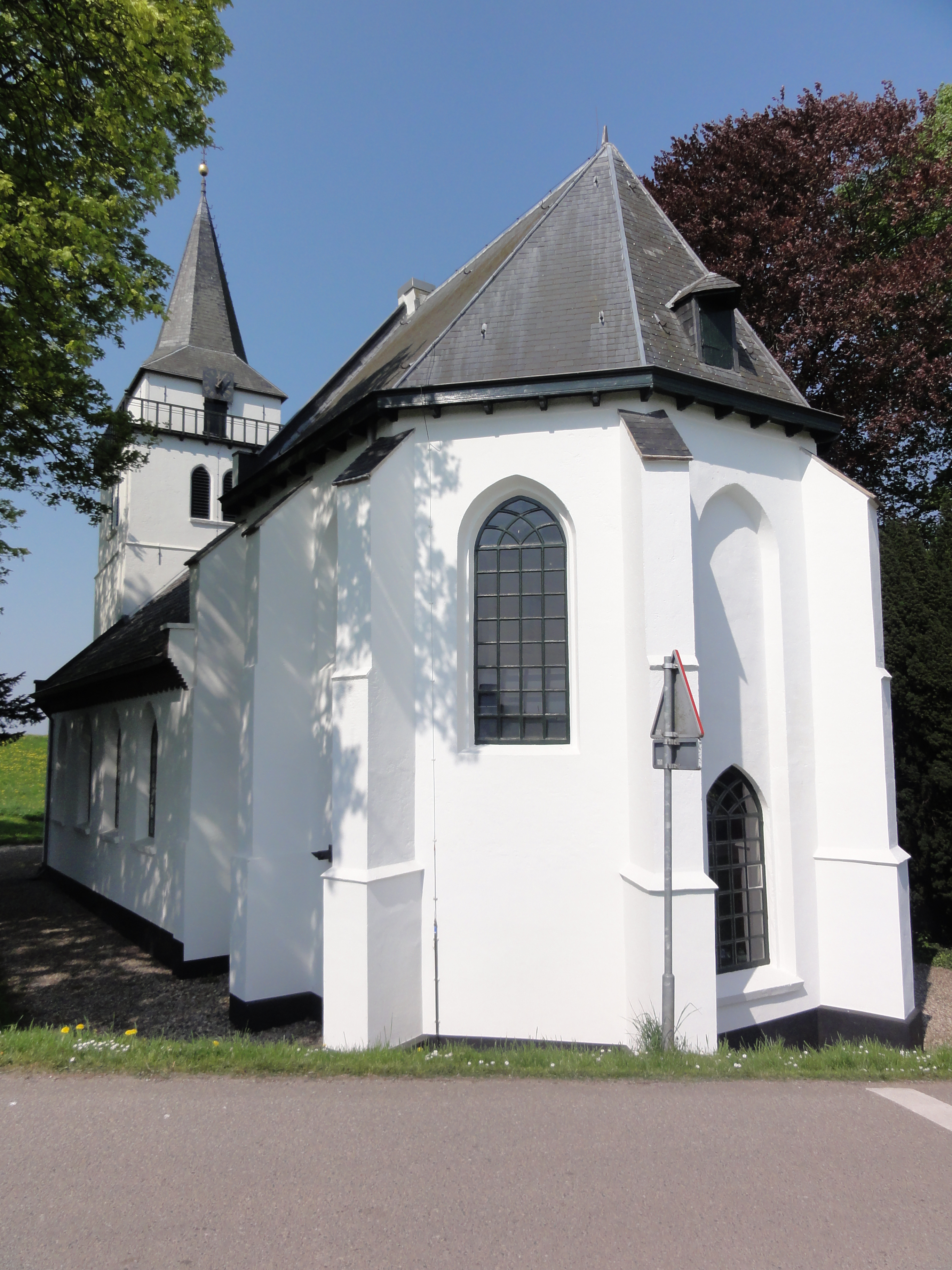 Slijk-Ewijk NH kerk achterkant 85″ N, 5° 47′ 08.61″ E